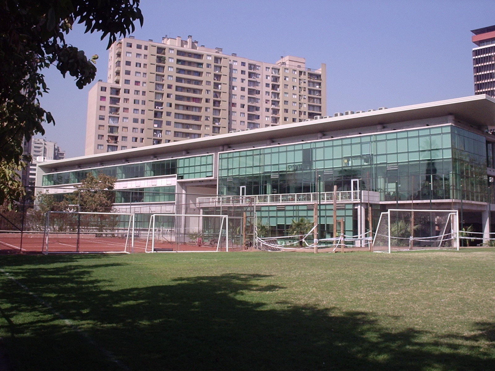 Edificio Tecnoaulas Facultad de Economía y Negocios, Universidad de Chile